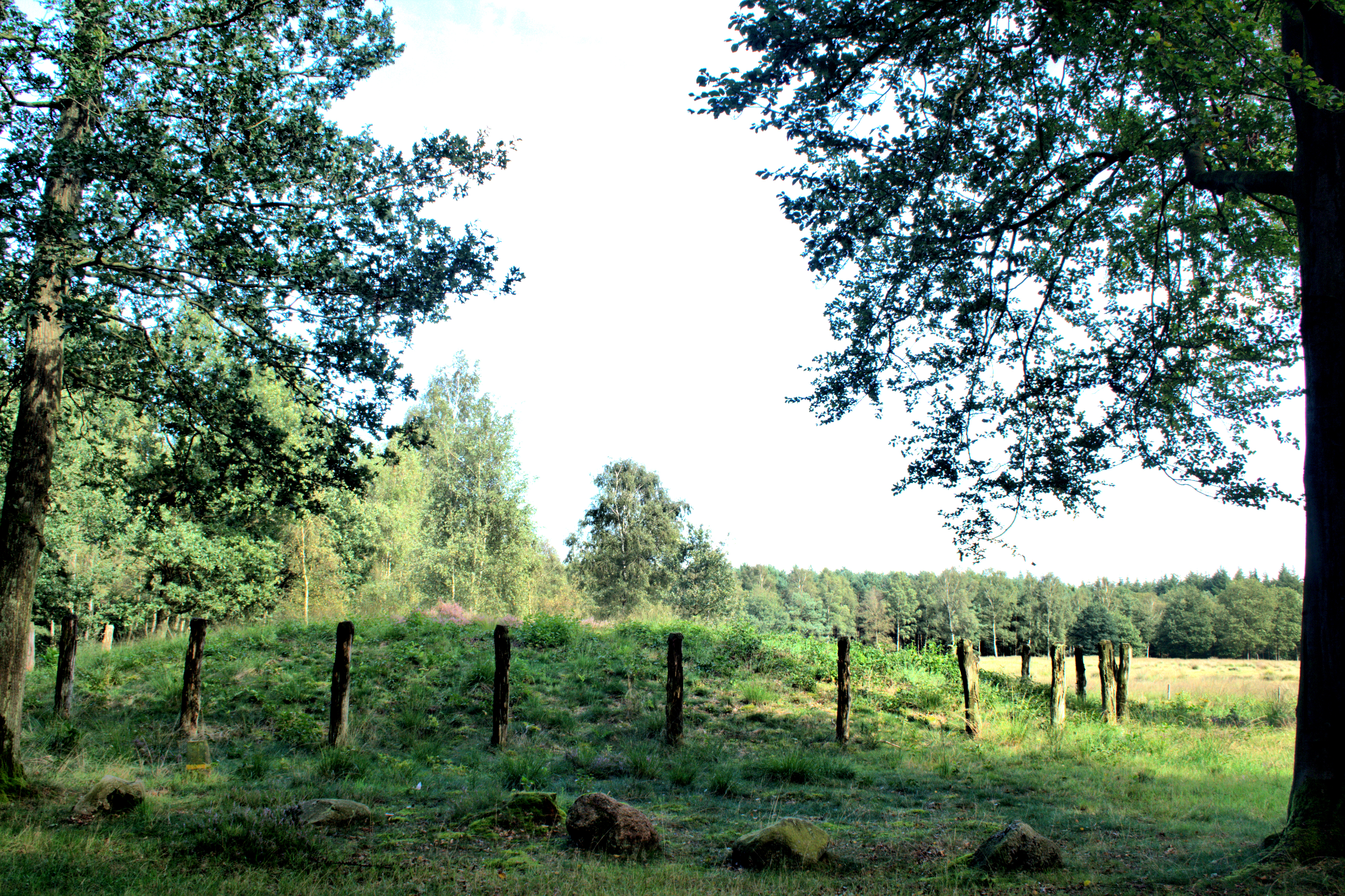 De Galgenberg op het Sleenerzand is de grootste van de 34 grafheuvels op deze open plek in het bos. Het is de vindplaats van 'de hoofdman van Sleen'. Dit is de rijkste vindplaats van bewoners uit deze tijd. De naam Galgenberg is afkomstig uit de middeleeuwen omdat hier (vermoedelijk) een galg heeft gestaan om veroordeelden terecht te stellen.